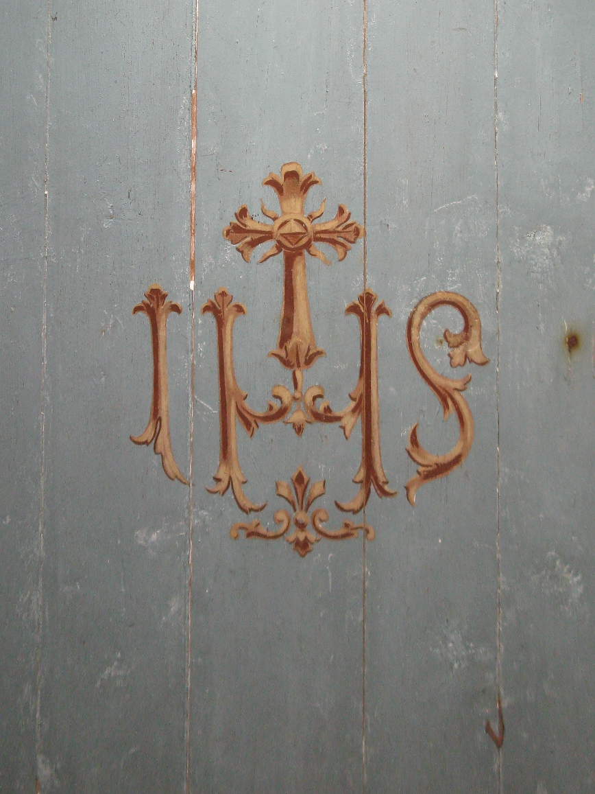 Monogram IHS na stropie w przedsionku kaplicy św. Marka w Sławkowie.